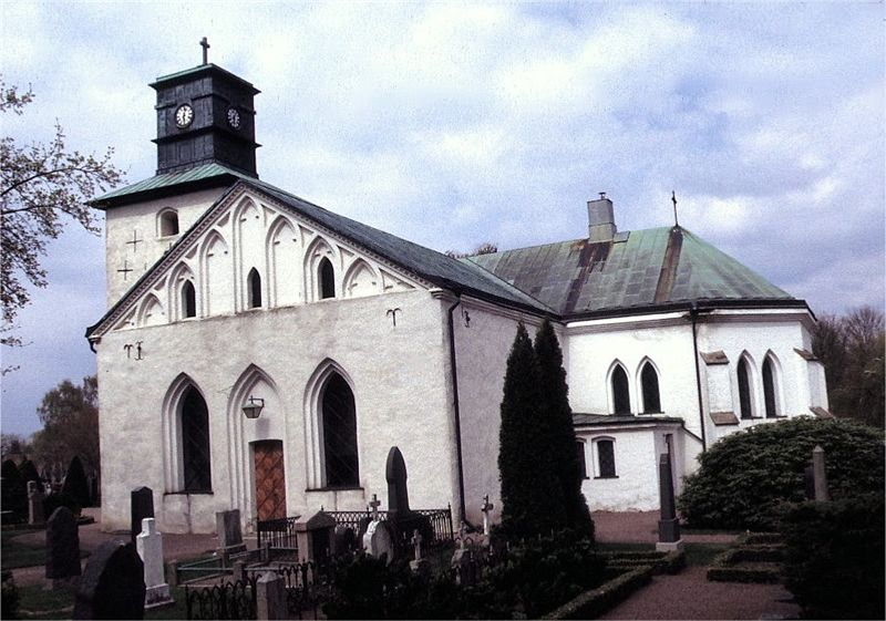 Strövelstorps kyrka i Skåne, Sverige. Strövelstorp kirke